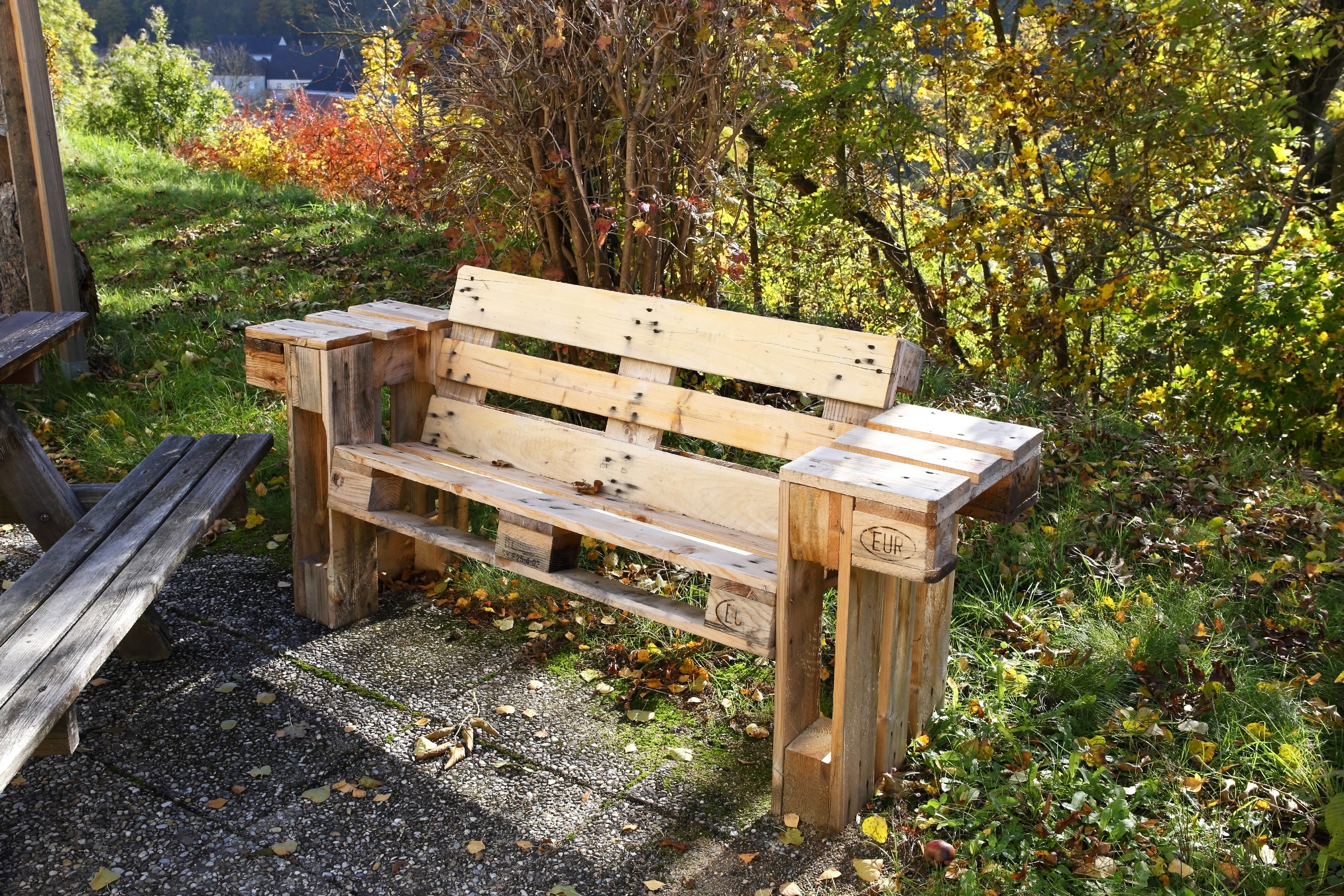 Sitzbank aus Europaletten bei der neuen Mittelschule von Rabbs an der Thaya.